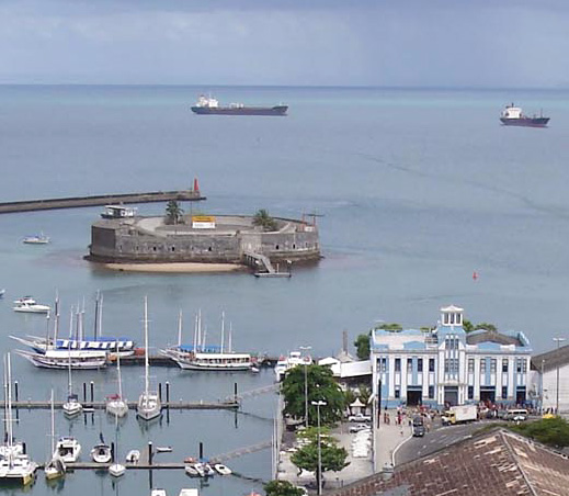 Sao Marcelo Fort in Salvador, Brazil